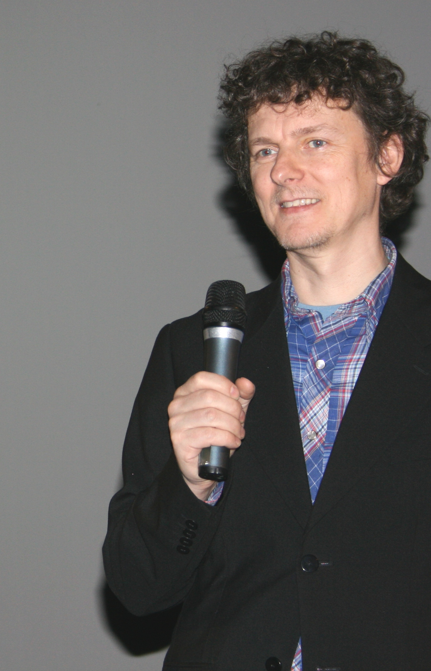 Michel Gondry à l'avant-première de Soyez sympas, rembobinez diffusée à l'UGC Ciné Cité Les Halles, à Paris.